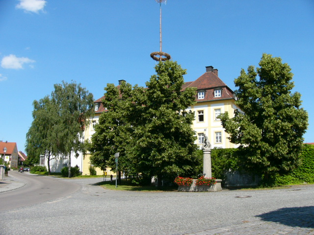 Ordensschloss mit Marktplatz in Absberg